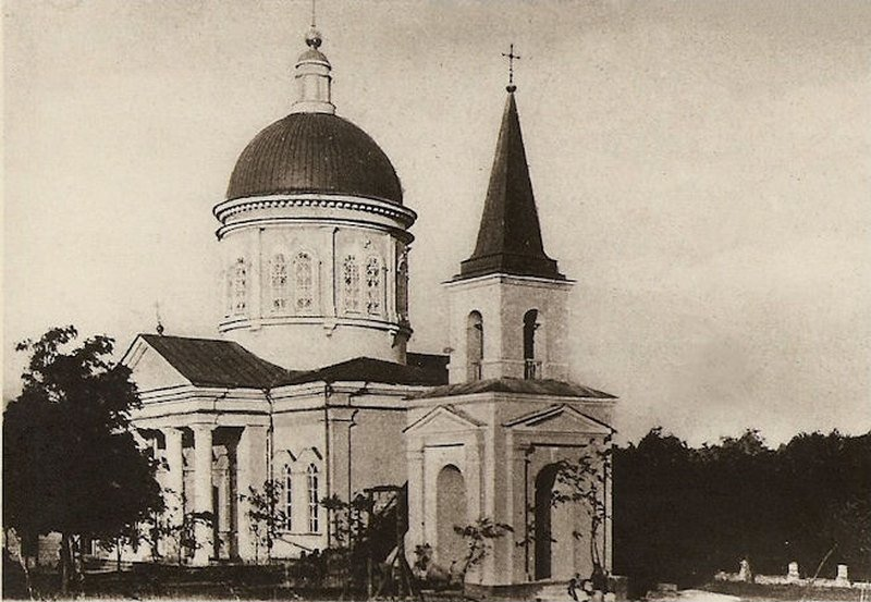 Храм Крестовозвиженского монастыря Сурб Хач (Святой Крест)